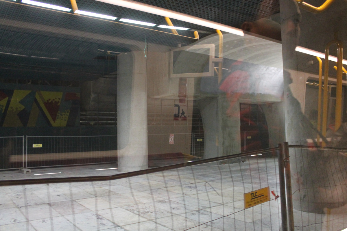 Peron stacji C13 Centrum Nauki Kopernik.